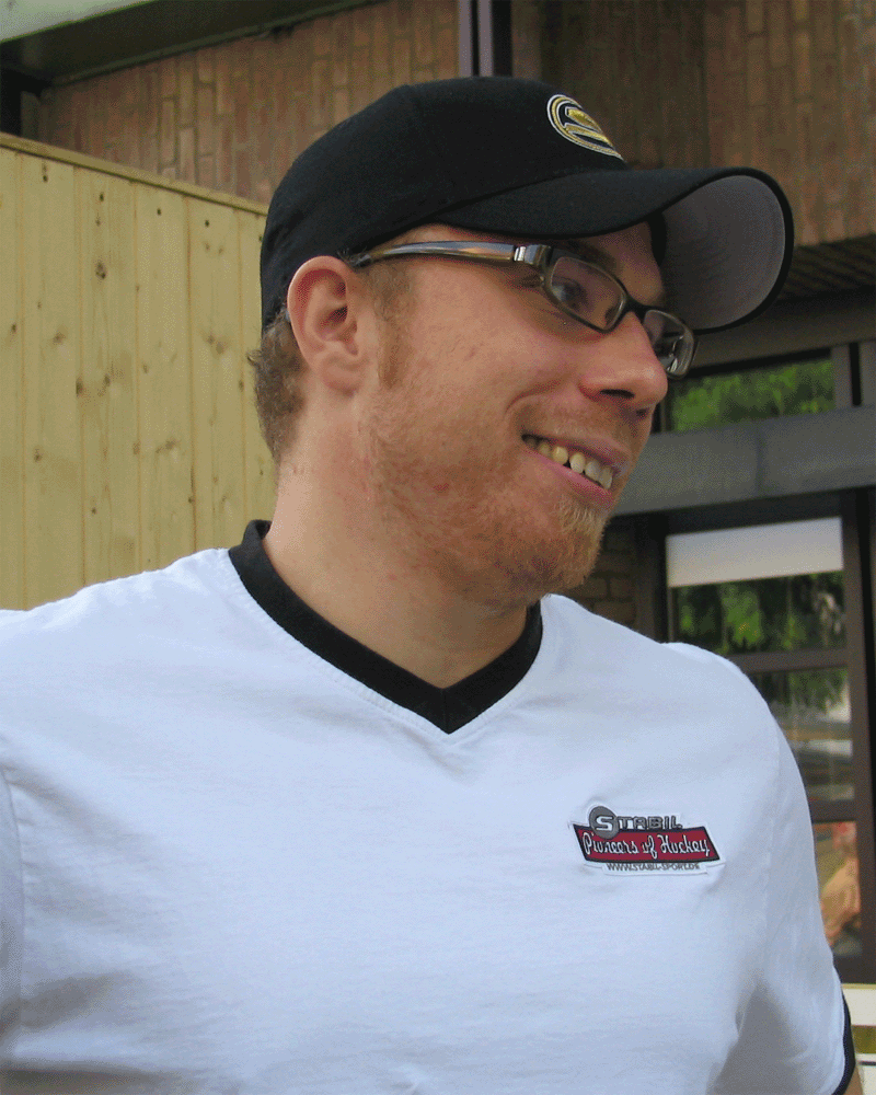 Porträt von Eishockey-Nationaltorhüter Robert Müller, aufgenommen auf einer Veranstaltung von Round Table Deutschland in Tönisvorst bei Krefeld.